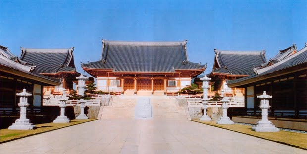 念佛宗三寶山無量壽寺 九州本山の本堂